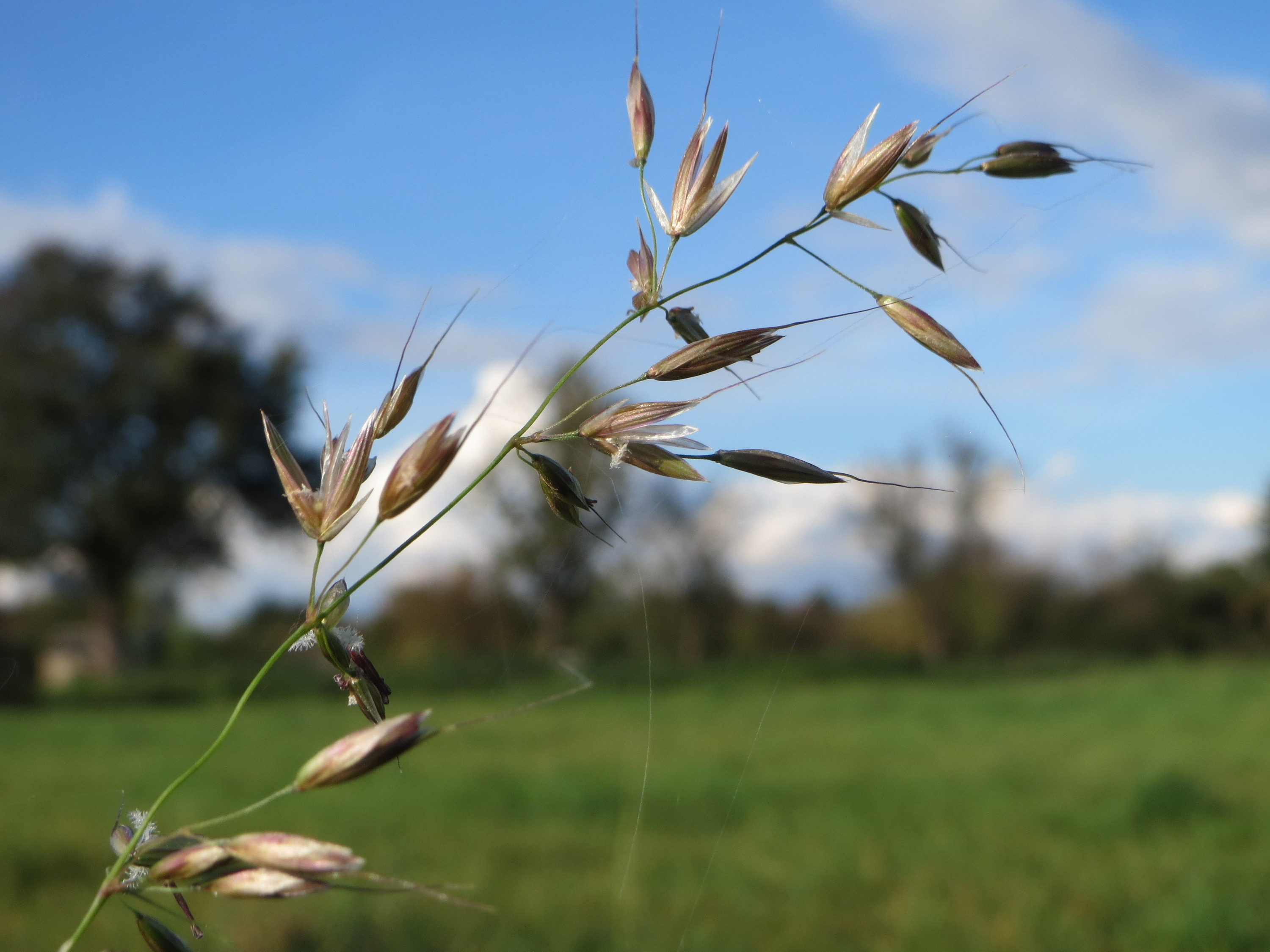 Gewöhnlicher Glatthafer (Arrhenatherum elatius) bei Hockenheim